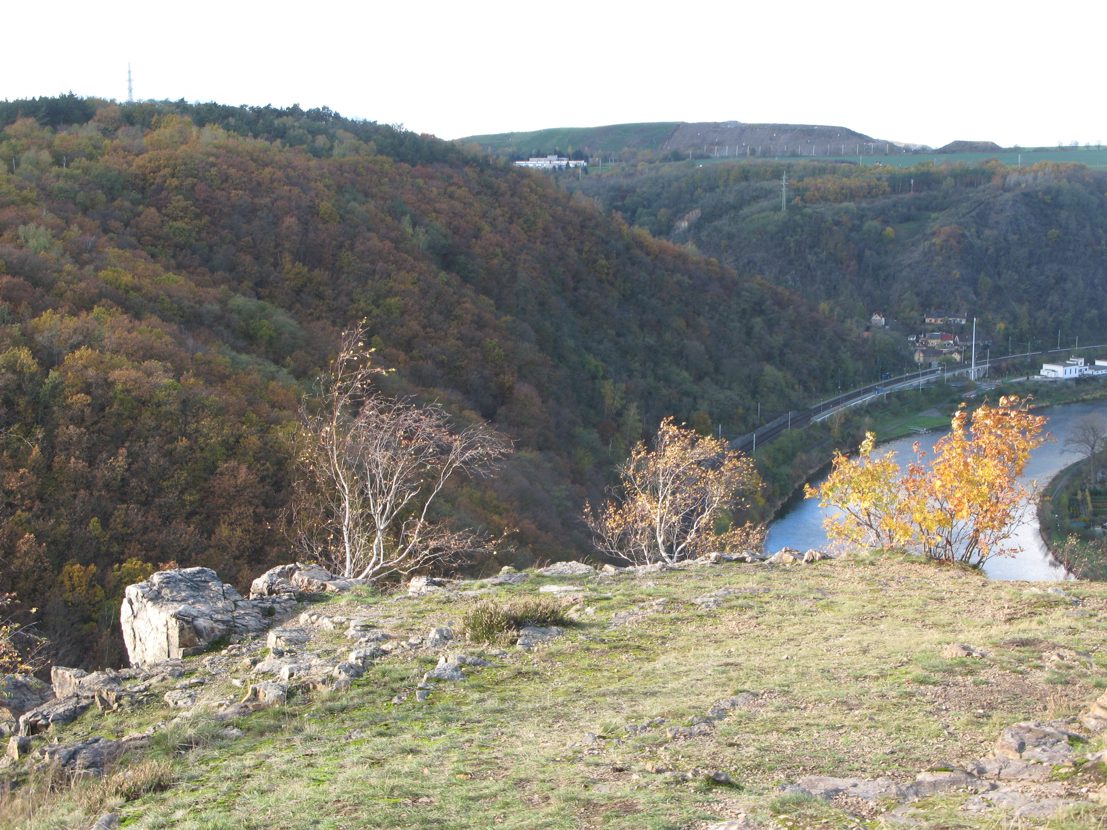 Pohled z vrchu Řivnáč u Roztok u Prahy, dole je vidět údolí Vltavy, vlaková stanice Úholičky a v pozadí skládka Úholičky.